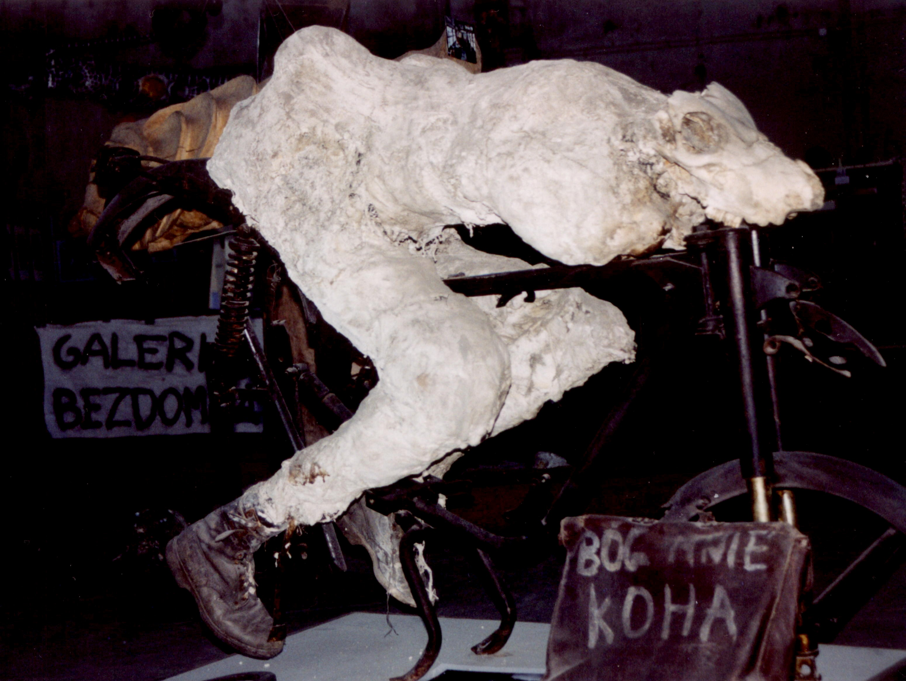 Instalacja w Galerii Bezdomnej, Szyb Wilson, Katowice